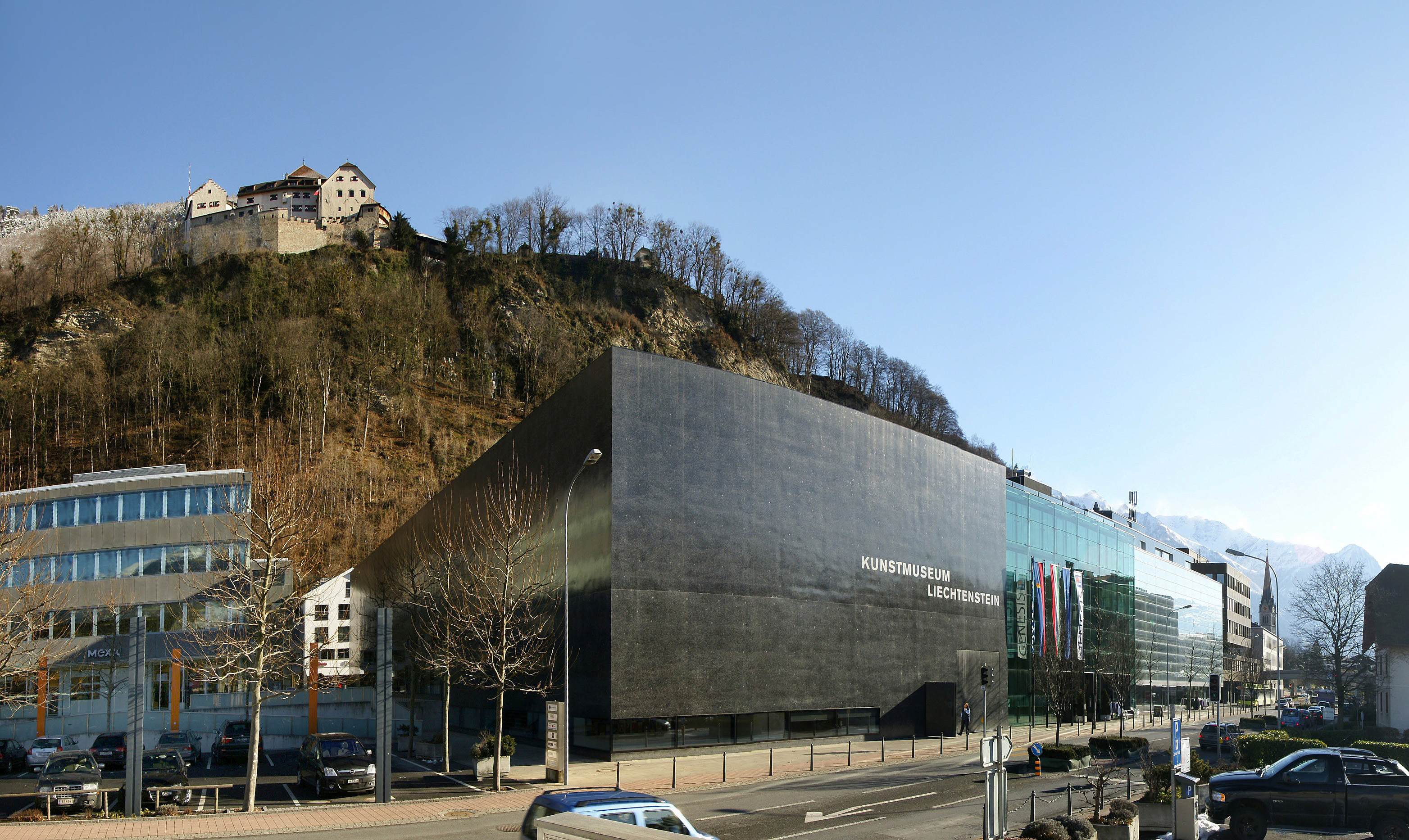 Panorama aus mehreren Bilder. Das Kunstmuseum Liechtenstein in Vaduz. Im oberen Bildrand das Schloss Vaduz